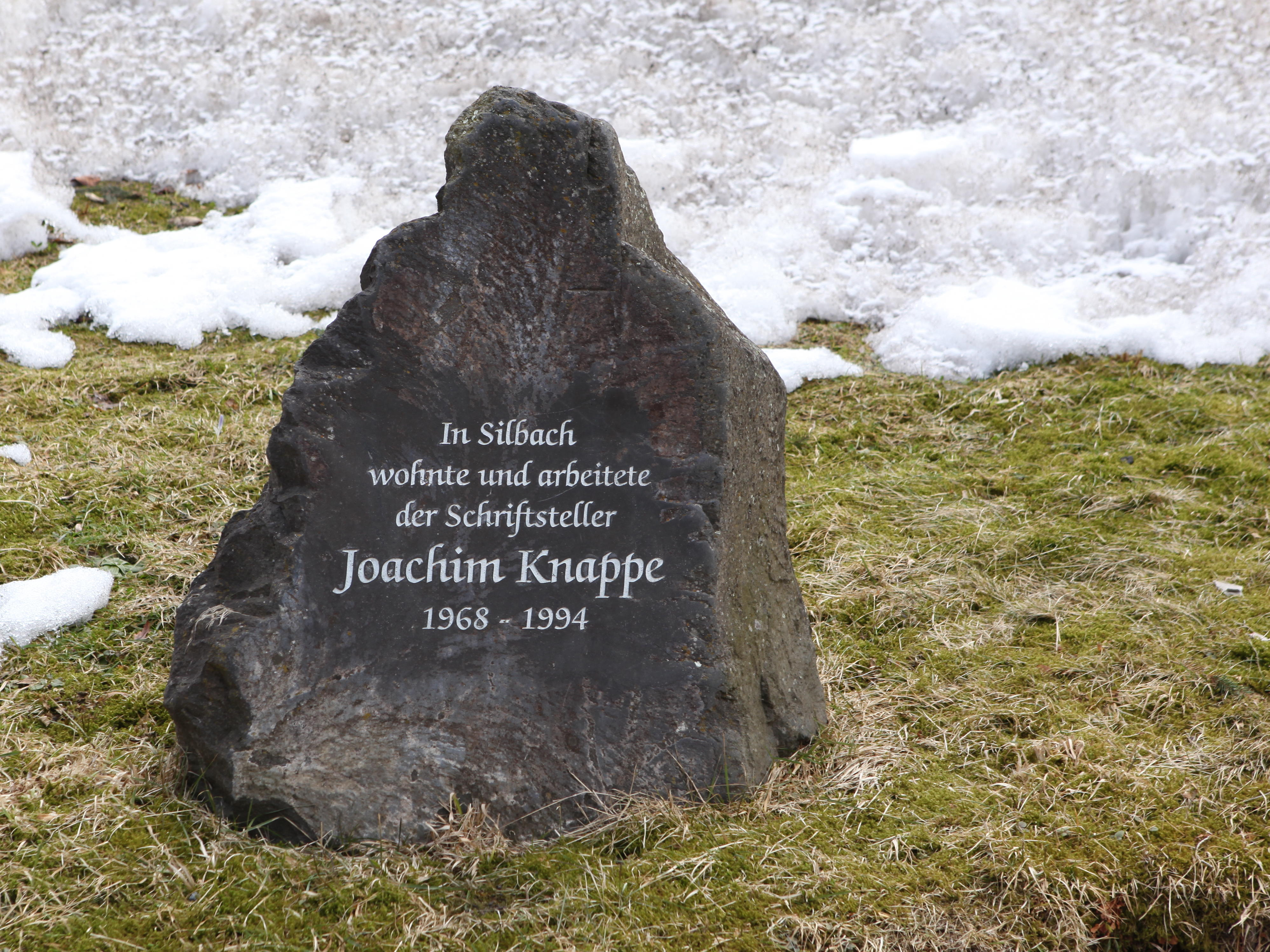 Joachim Knappe Gedenkstein in Silbach, Ot von Nahetal-Waldau, Landkreis Hildburghausen